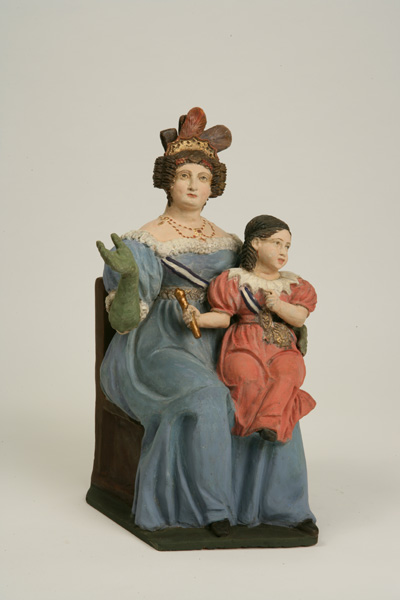 Figura de barro. María Cristina de Borbón y su hija Isabel II.